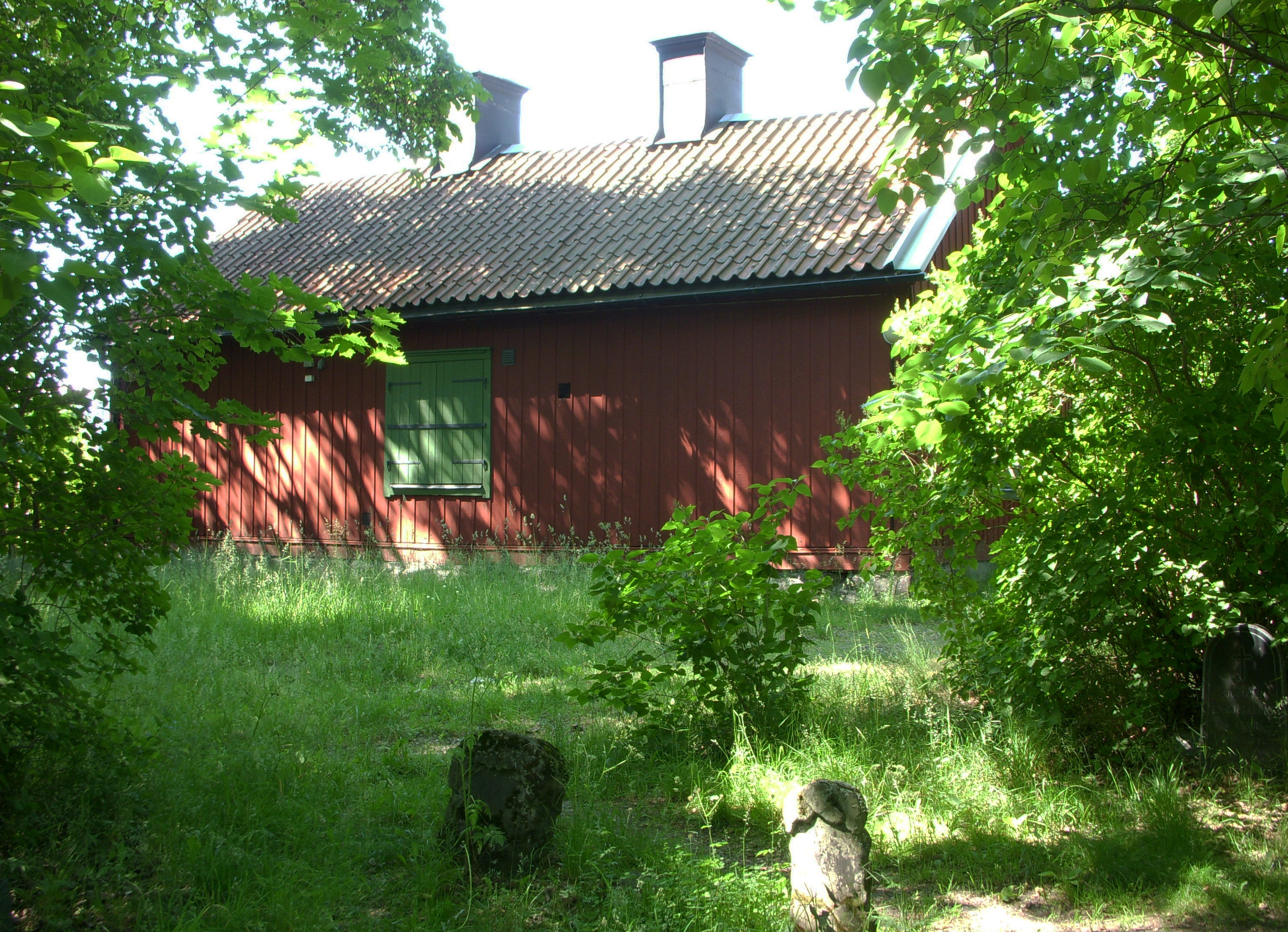 Bostället 1, Olaus Magnus Väg 5, Johanneshov (dödgrävarbostället på Kolerakyrkogården)